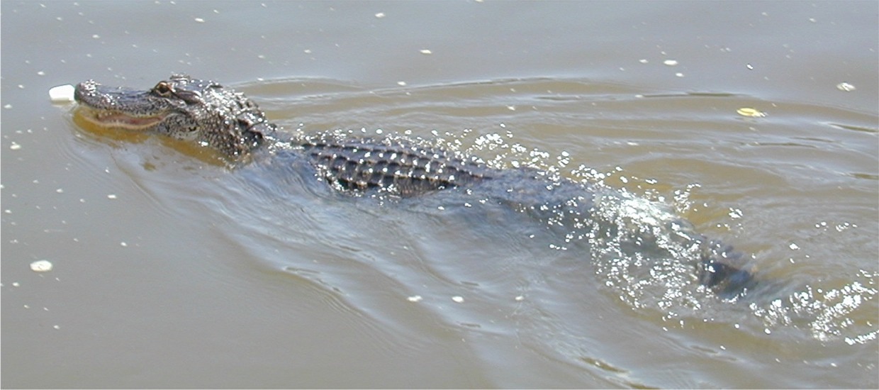 Grinning Alligator mississippiensis